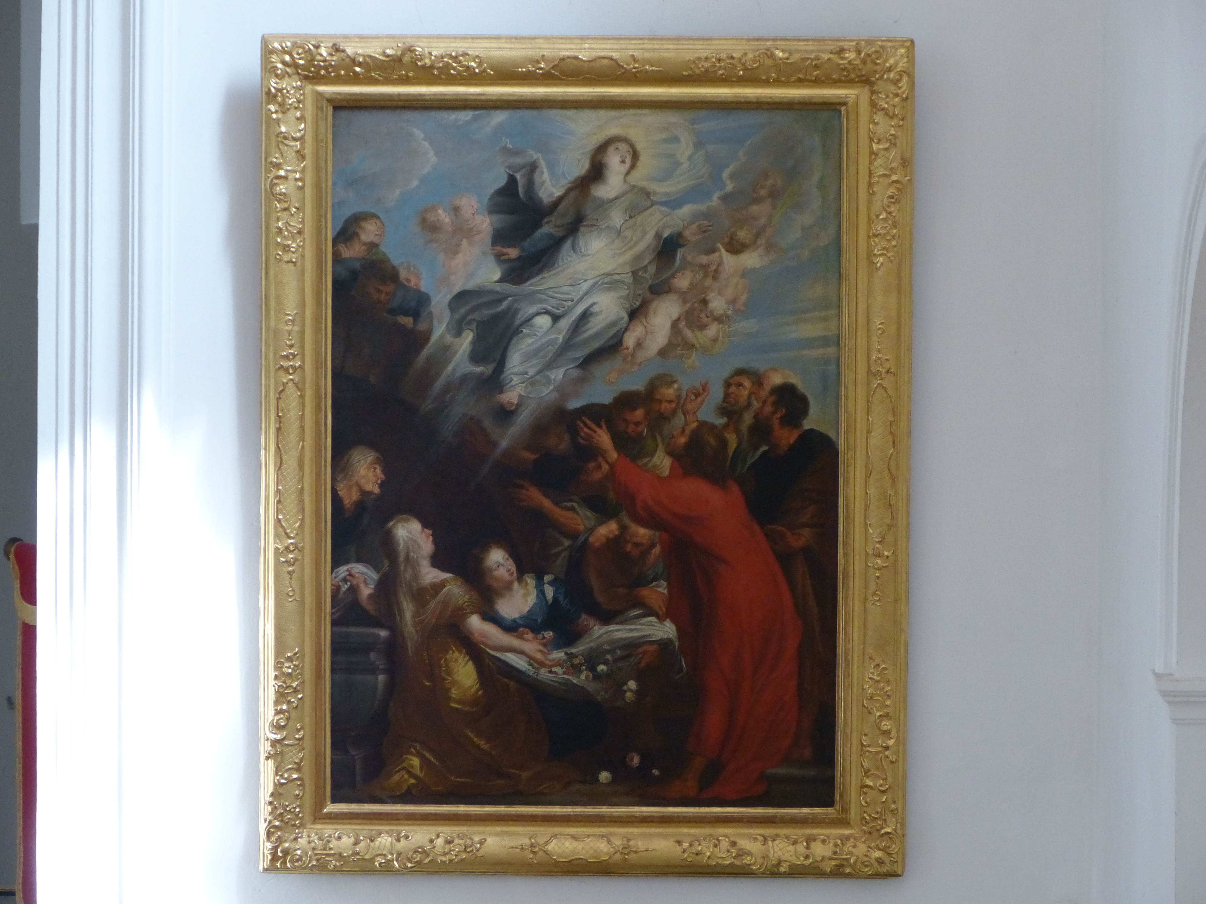 St. Peter und Paul, Kirchheim in Schwaben, Landkreis Unterallgäu, Bayern